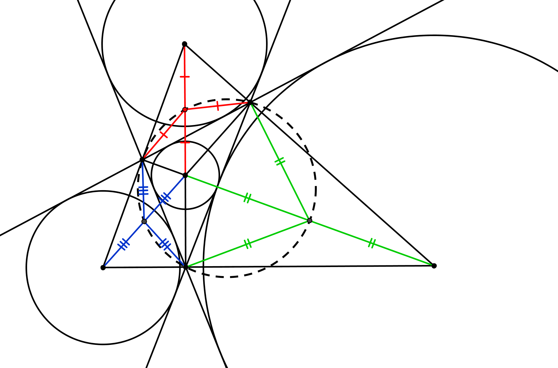 трезубец окр эйлера6